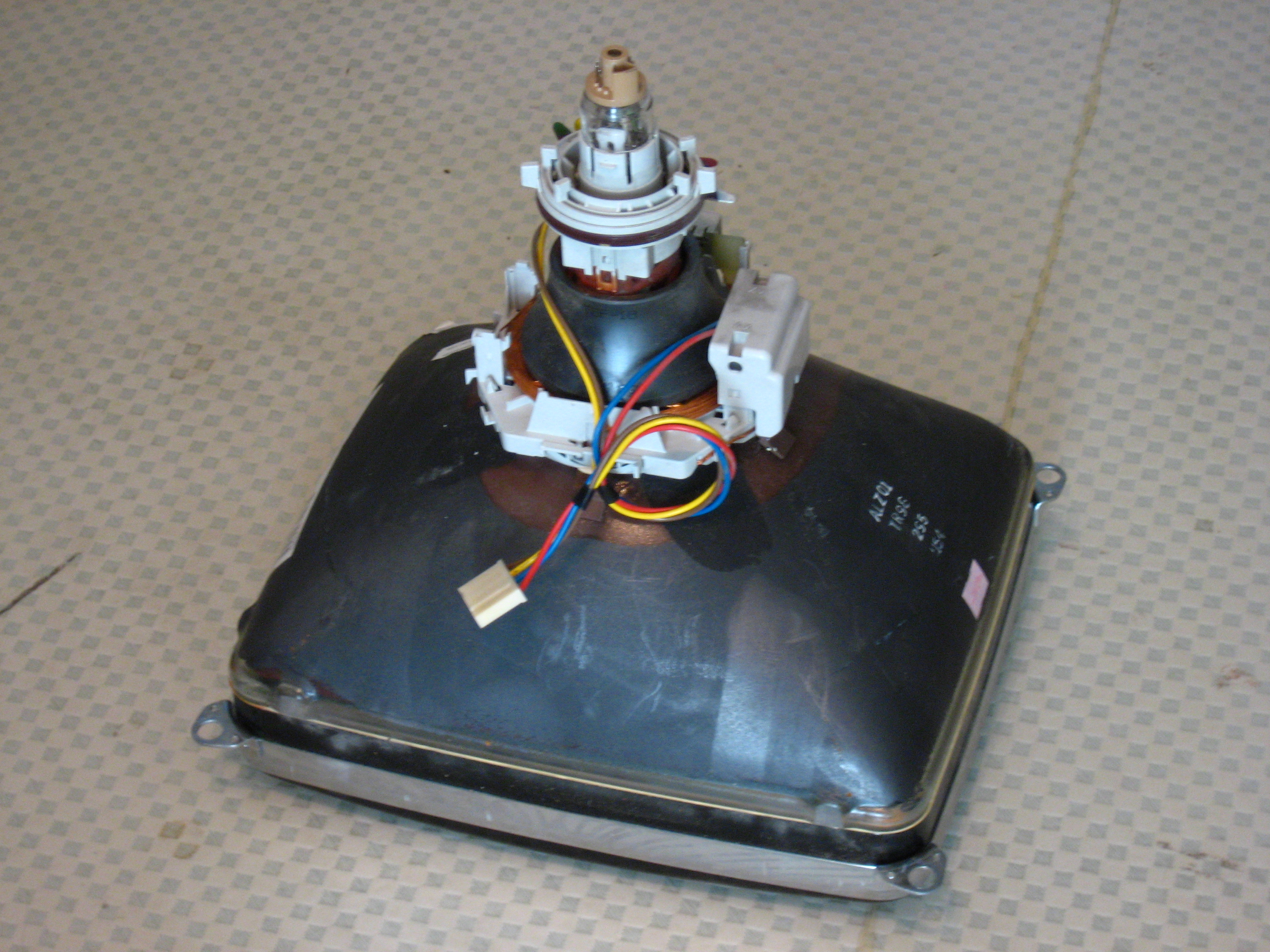 Kuvaputki, katodisädeputki / Cathode ray tube